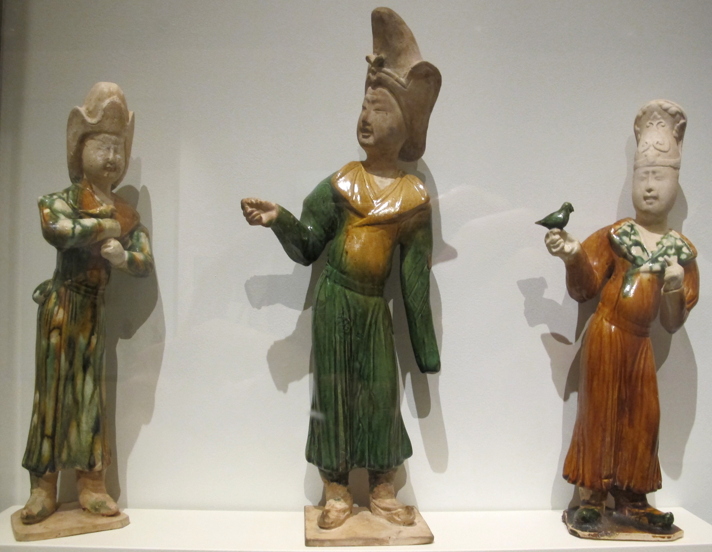 Dinastia tang, tre falconieri, cina del nord, VIII sec